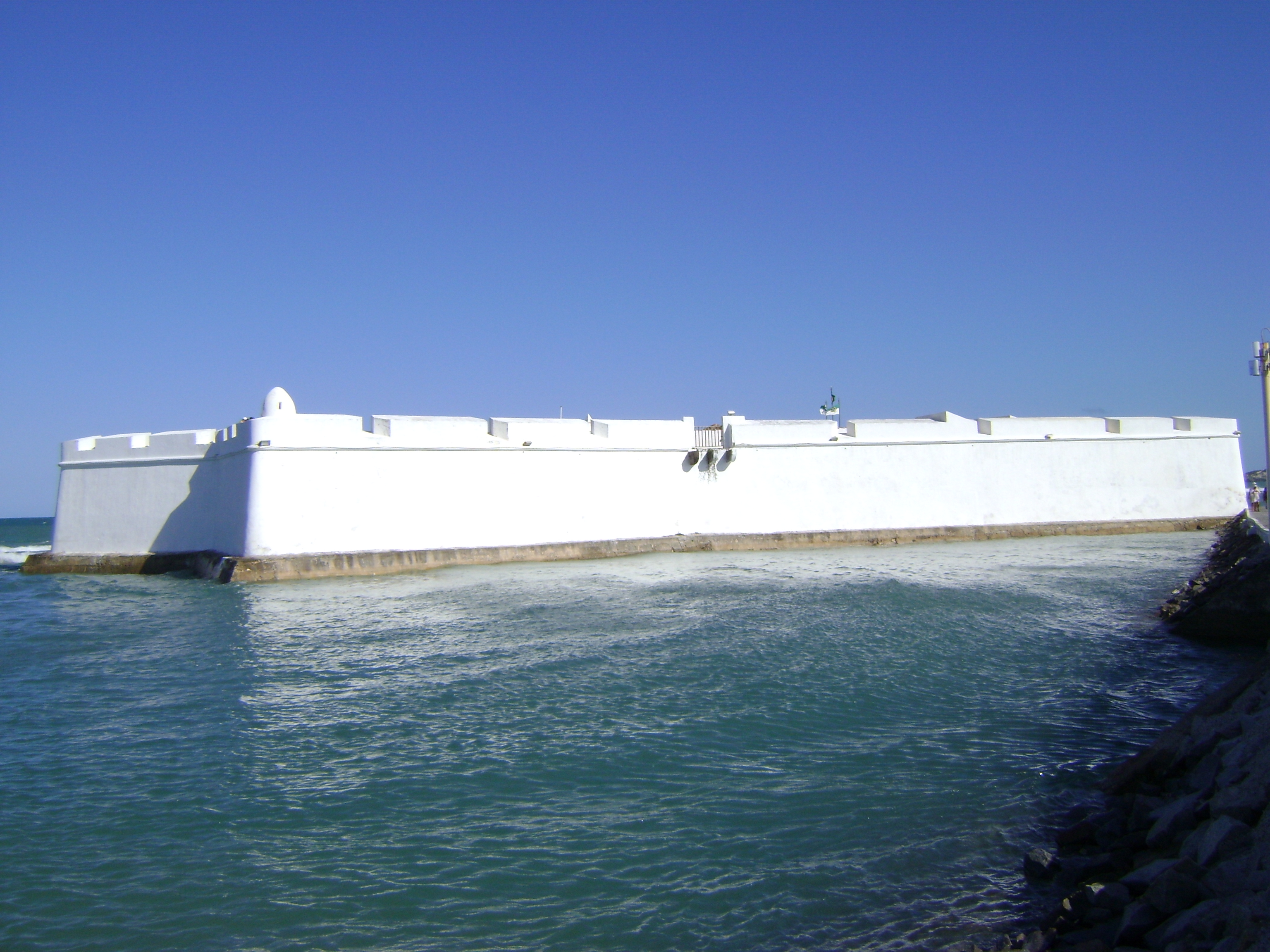 Forte dos Reis Magos, Natal (RN), Brasil